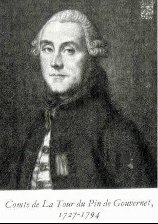 Jean-Frédéric de La Tour du Pin Gouvernet (1727-1794), gravure d'après un tableau de Jean-Baptiste Greuze